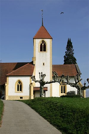 Cudrefin: l'église à Montet (Vully)